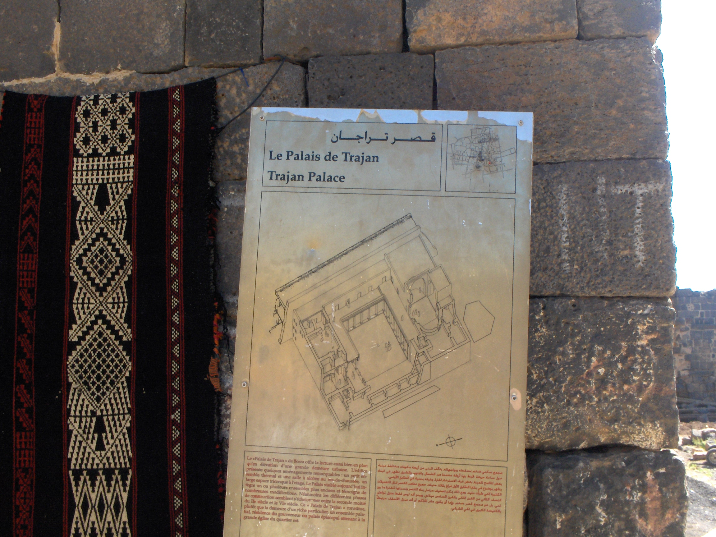 Ricostruzione del palazzo di Traiano di Bosra, Siria